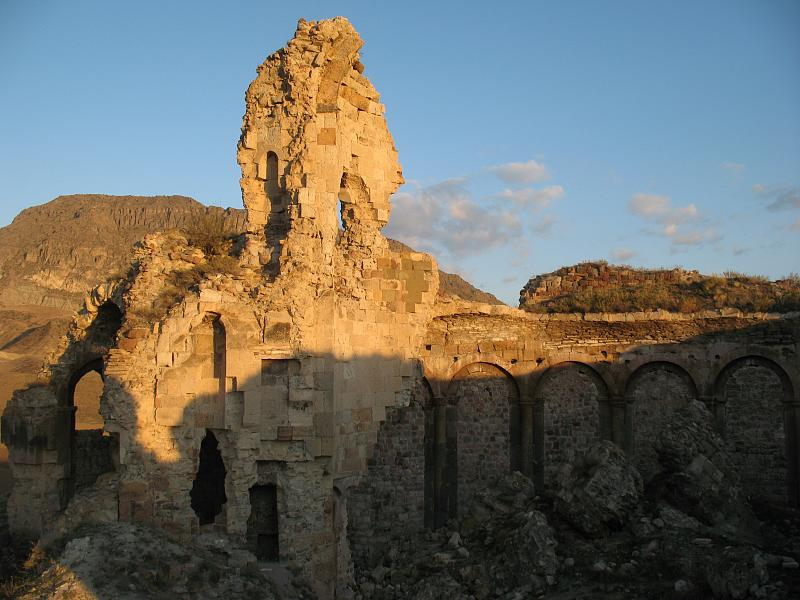 Restanten van een Armeens-Georgische kerk, in Penek (Georgisch: Bana)